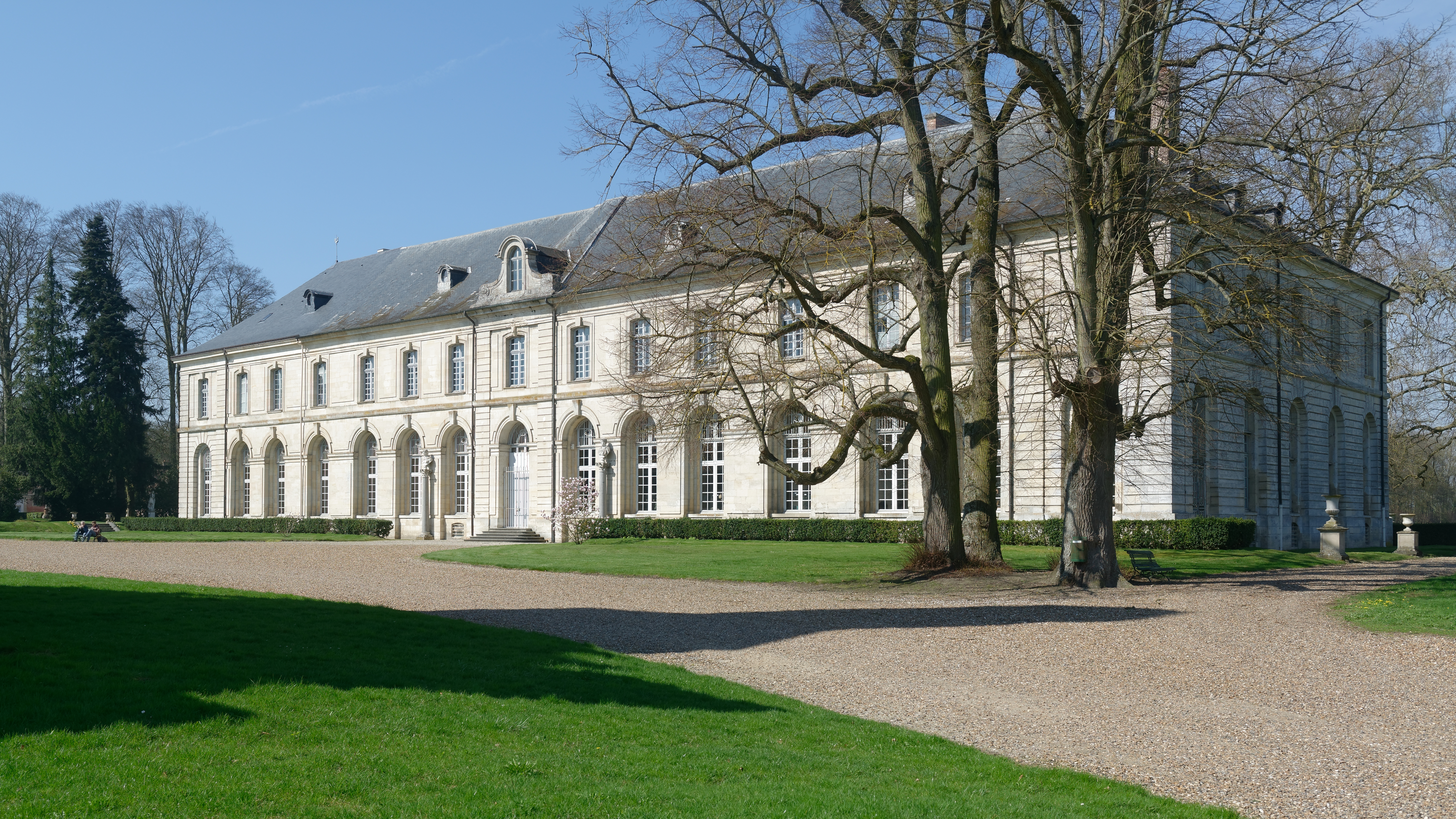 Château du domaine de Chaalis, Oise, France.